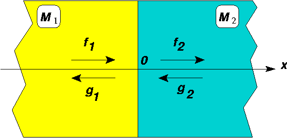 Schéma de l'interface entre deux milieux acoustiques